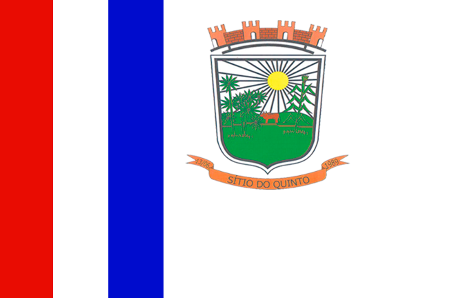 Bandeira do Município de Sítio do Quinto.